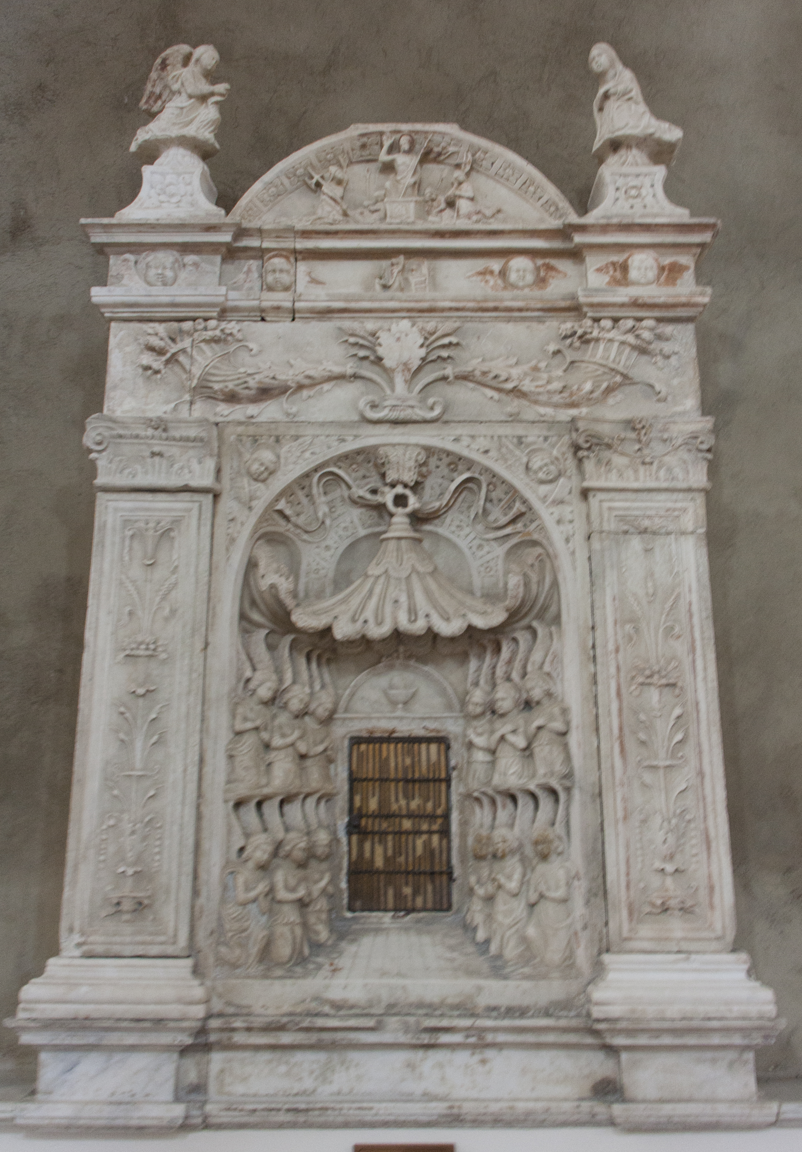 Ciborio - Scuola Gaginiana 1566 (140x200 cm)